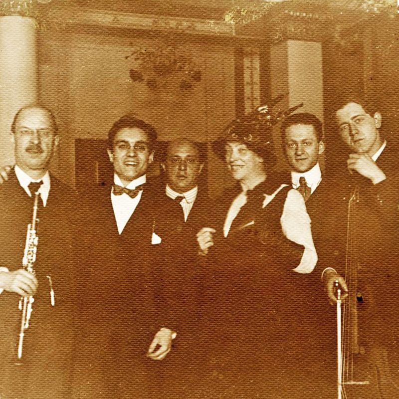 Ensemble der Uraufführung des Pierrot Lunaire von Arnold Schönberg am 16. Oktober 1912 im Berliner Choralion-Saal. Mitwirkende: Albertine Zehme (Rezitation), Hans W. de Vries (Flöte), Karl Essberger (Klarinette), Jakob Malinjak (Geige), Hans Kindler (Cello), Eduard Steuermann (Klavier)